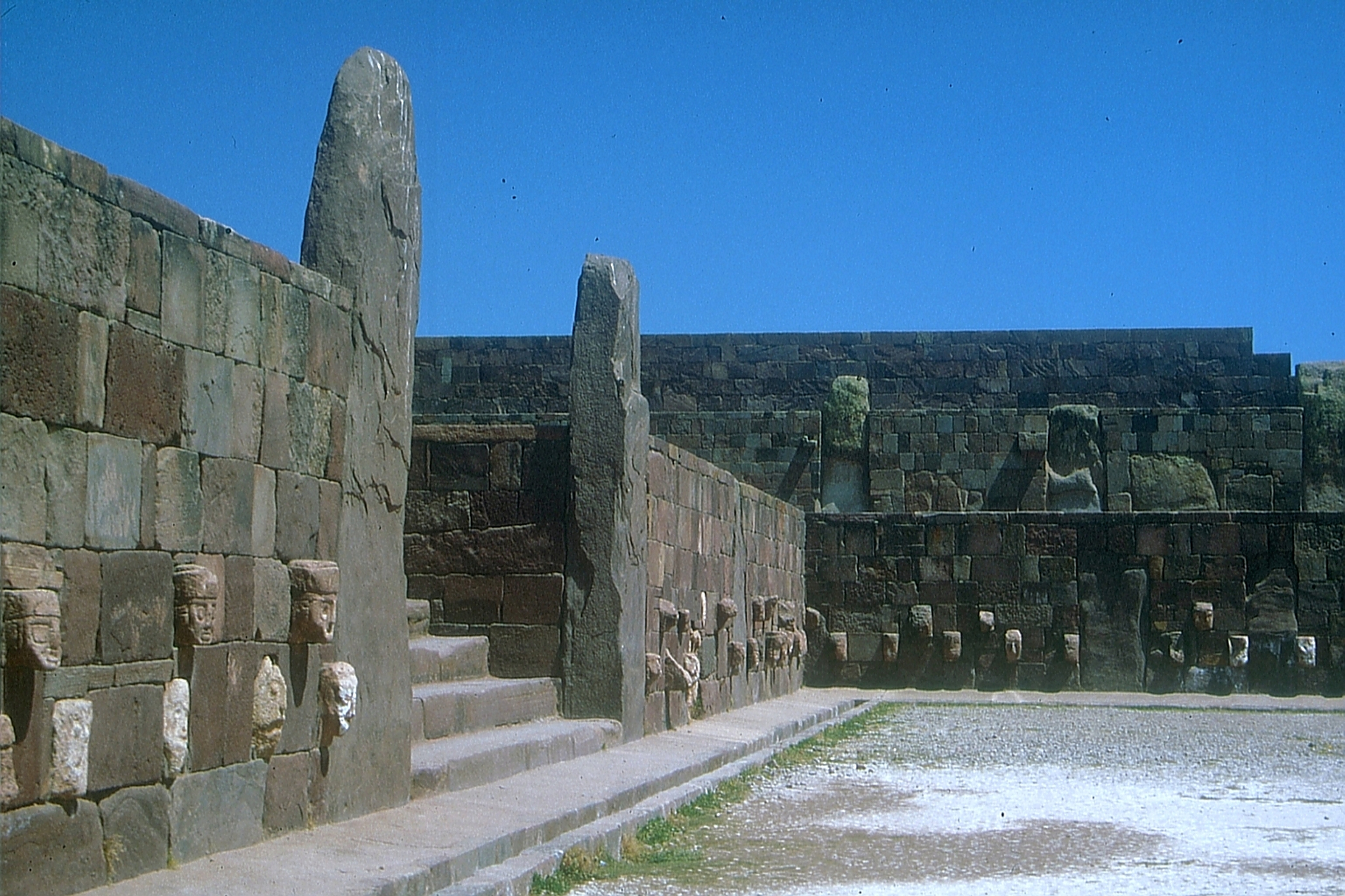 Tiwanaku - der "Versunkene Hof" ist von Steinmauern mit Relieffiguren umgeben.